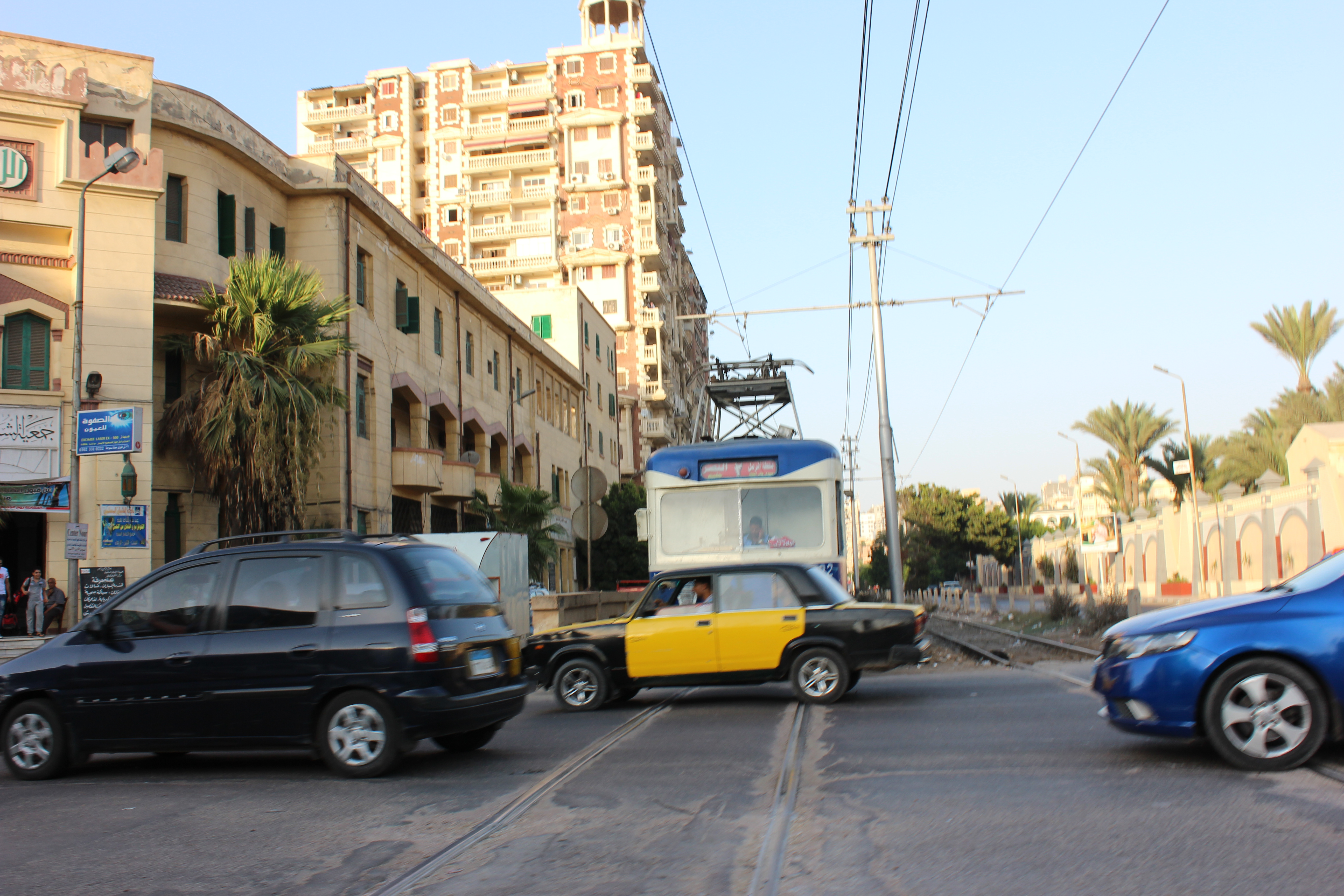 مباني الإسكندرية وبعض العلامات المميزة.